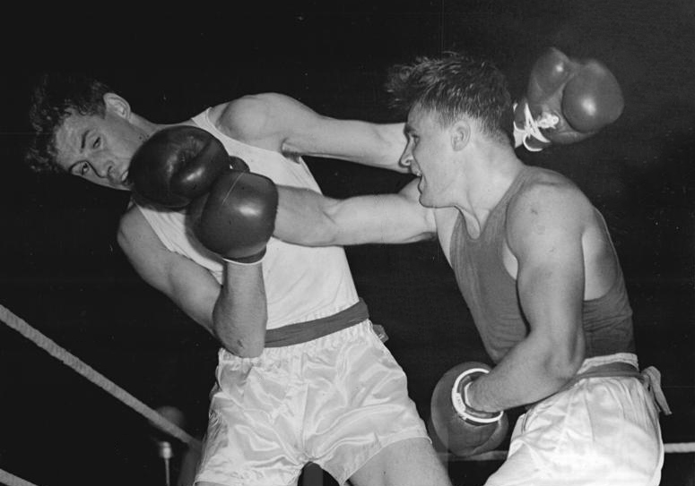 Bruce Wells, Schatkow Zentralbild Sport & General Gey-Ho. 9 Motive 15.10.1955 Boxländerkampf England-UdSSR 4:16. Zu einem eindrucksvollen Sieg kam die sowjetische Boxstaffel am Mittwoch in London beim Länderkampf gegen England. Der Gastgeber musste sich im Gesamtergebnis mit 16:4 hoch geschlagen bekennen. UBz: Mittelgewichts-Europameister Schatkow (UdSSR) hatte sich mit Bruce Wells (links), dem Halbmittelgewichts-Europameister von 1953, auseinanderzusetzen und musste dem Engländer nach drei ausgeglichenen Runden einen knappen Punktsieg überlassen.